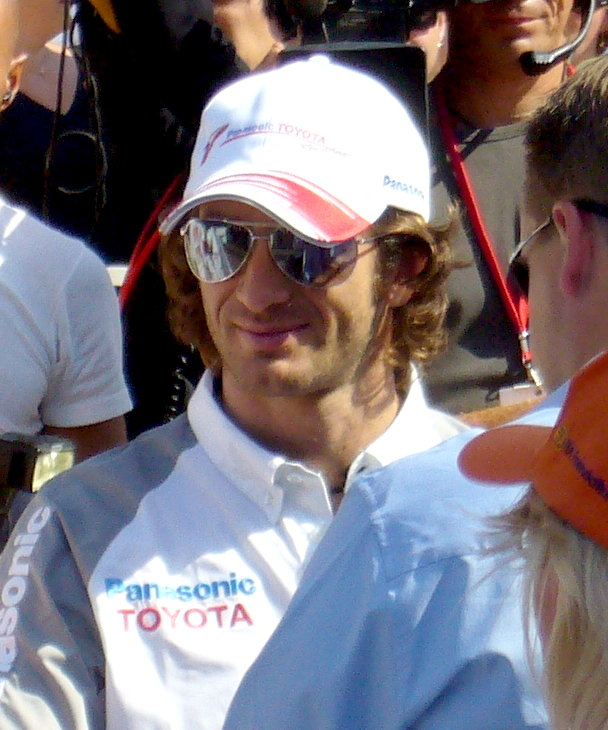 F1 driver Jarno Trulli in Helsinki in August 2006